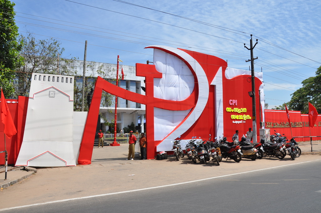 Cpi state sammelan 2012 venue at Kollam